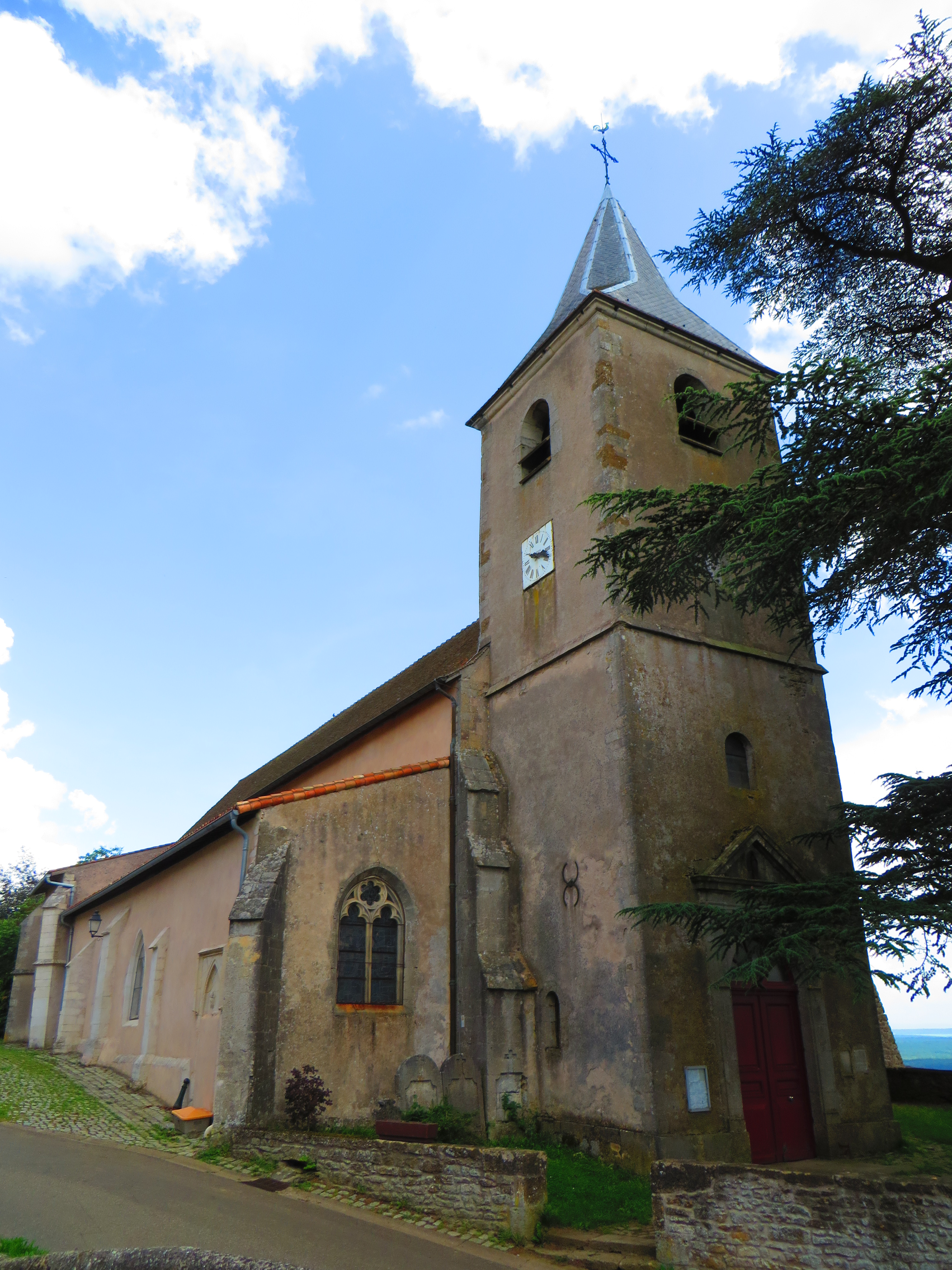 Amance Église Saint-Jean-Baptiste